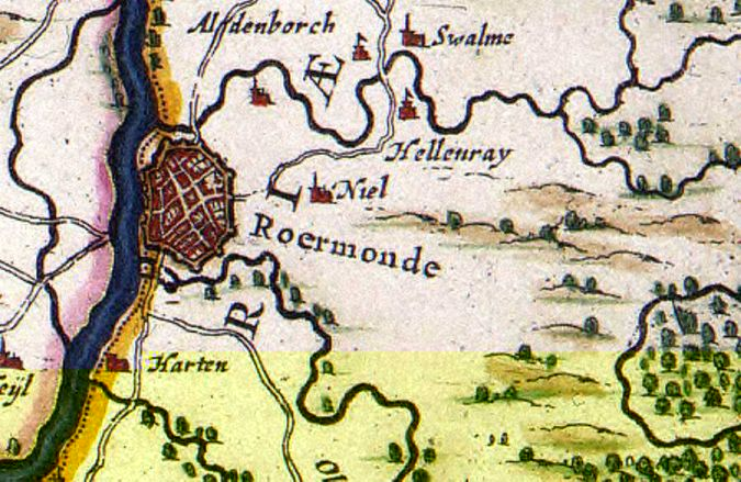 Bron: Atlas van der Hagen, Volume 2, Koninklijke Bibliotheek Den Haag Titel: BRABANTIAE pars Orientalis ; continens; Amsterdam: Sumptibus Frederici de Wit Jaar: na 1688 Maker: Frederik de Wit Type: kaart, kopergravure, 45,5 x 54 cm. Ligging: Brabant, België Commentaar: Deze kaart van Spaans (Belgisch) Brabant werd uitgegeven door Frederik de Wit (1630-1706). Zoals vele van zijn kaarten is ook deze niet gedateerd. Om deze kaart te tekenen heeft De Wit oudere kaarten uit de begin 17de eeuw gebruikt.